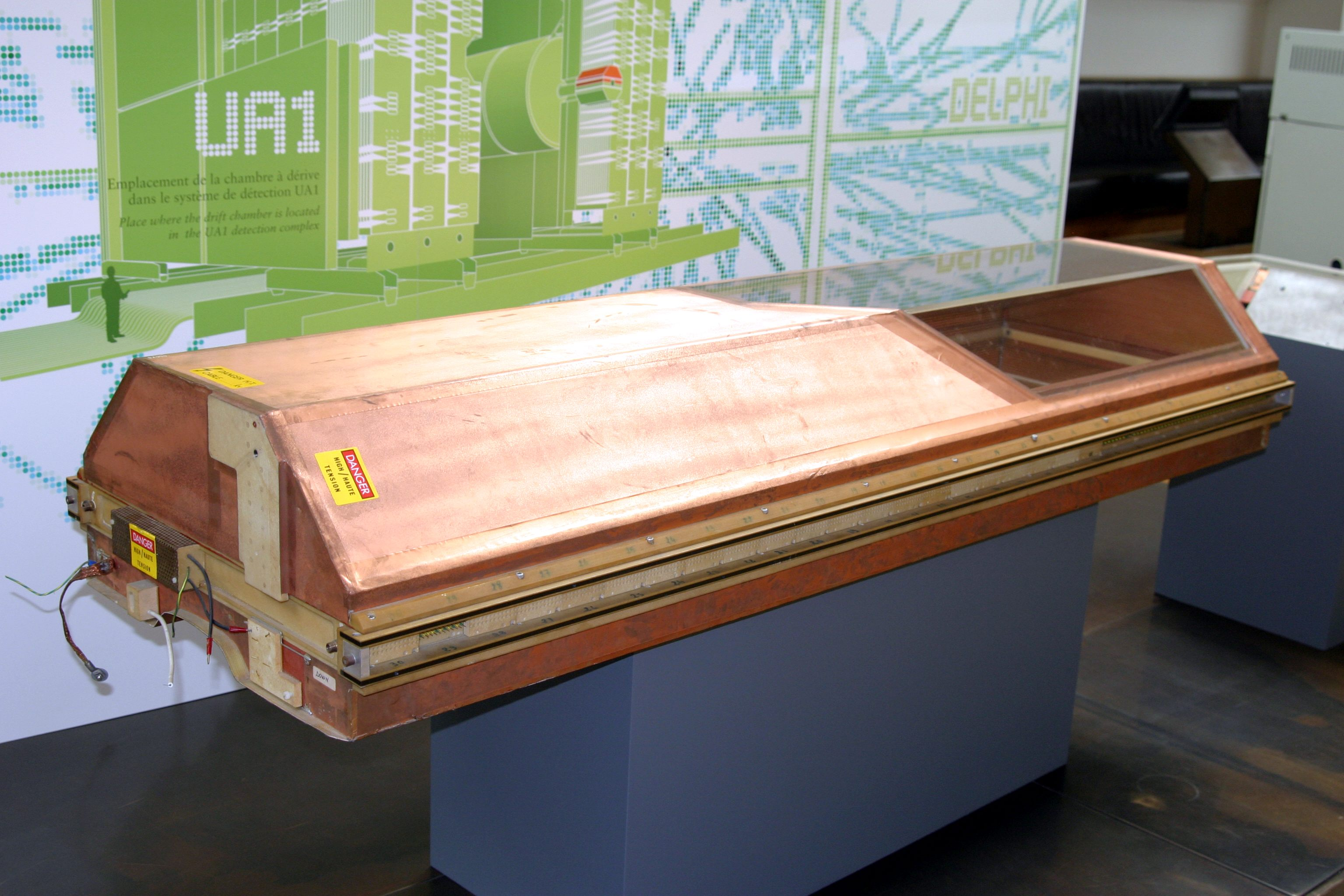 Drift chamber: element of the UA1 detector on display at the Musée des Arts et métiers